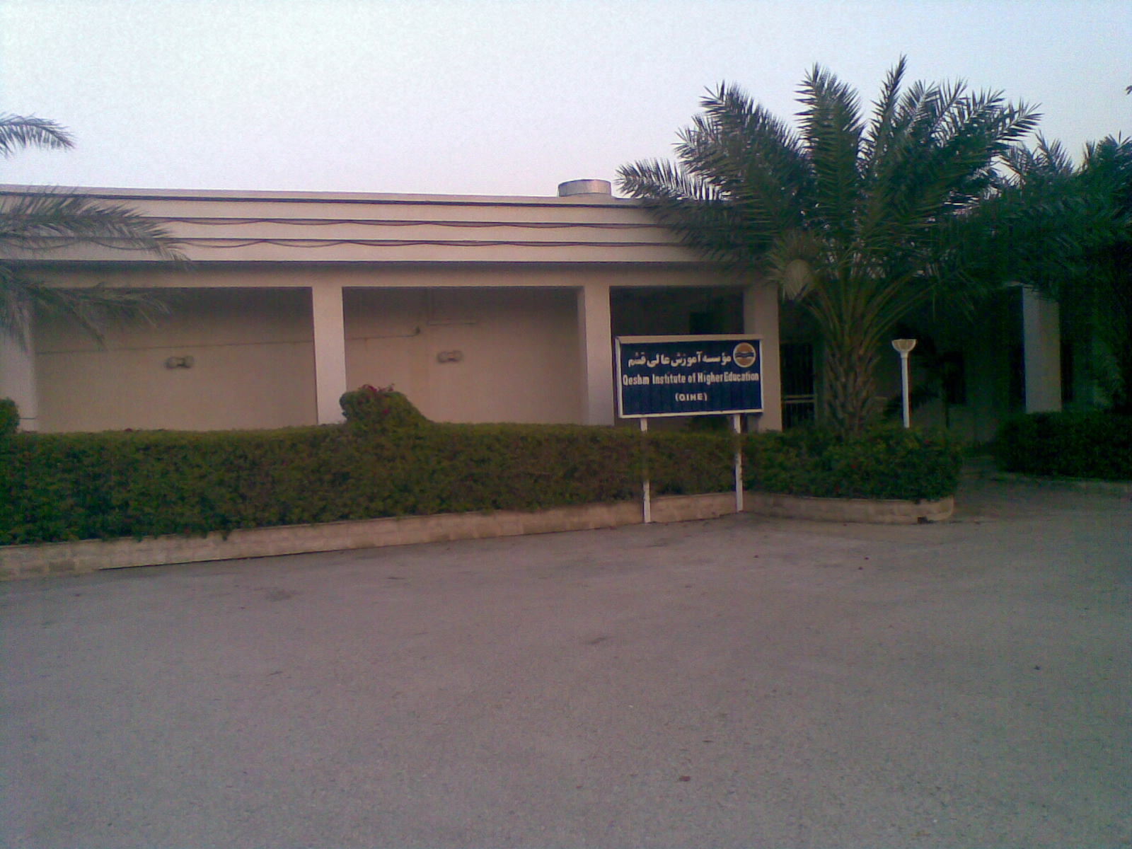 موسسه آموزش عالی قشم (کلاه فرنگی قشم)